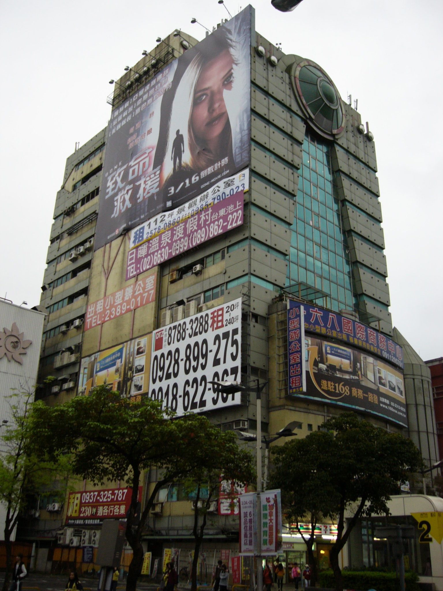 英雄廣場商業大樓，位於臺北市中正區中華路一段59號。